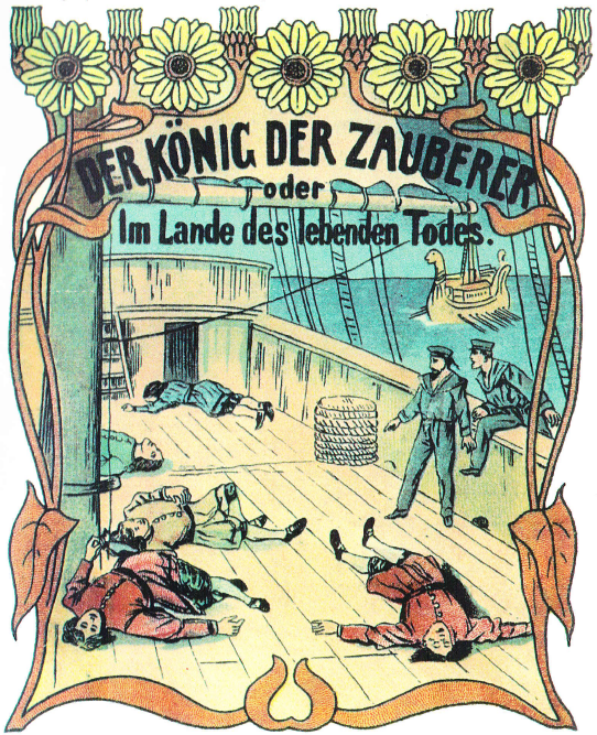 Der König der Zauberer. Titelbild des Heftromans.